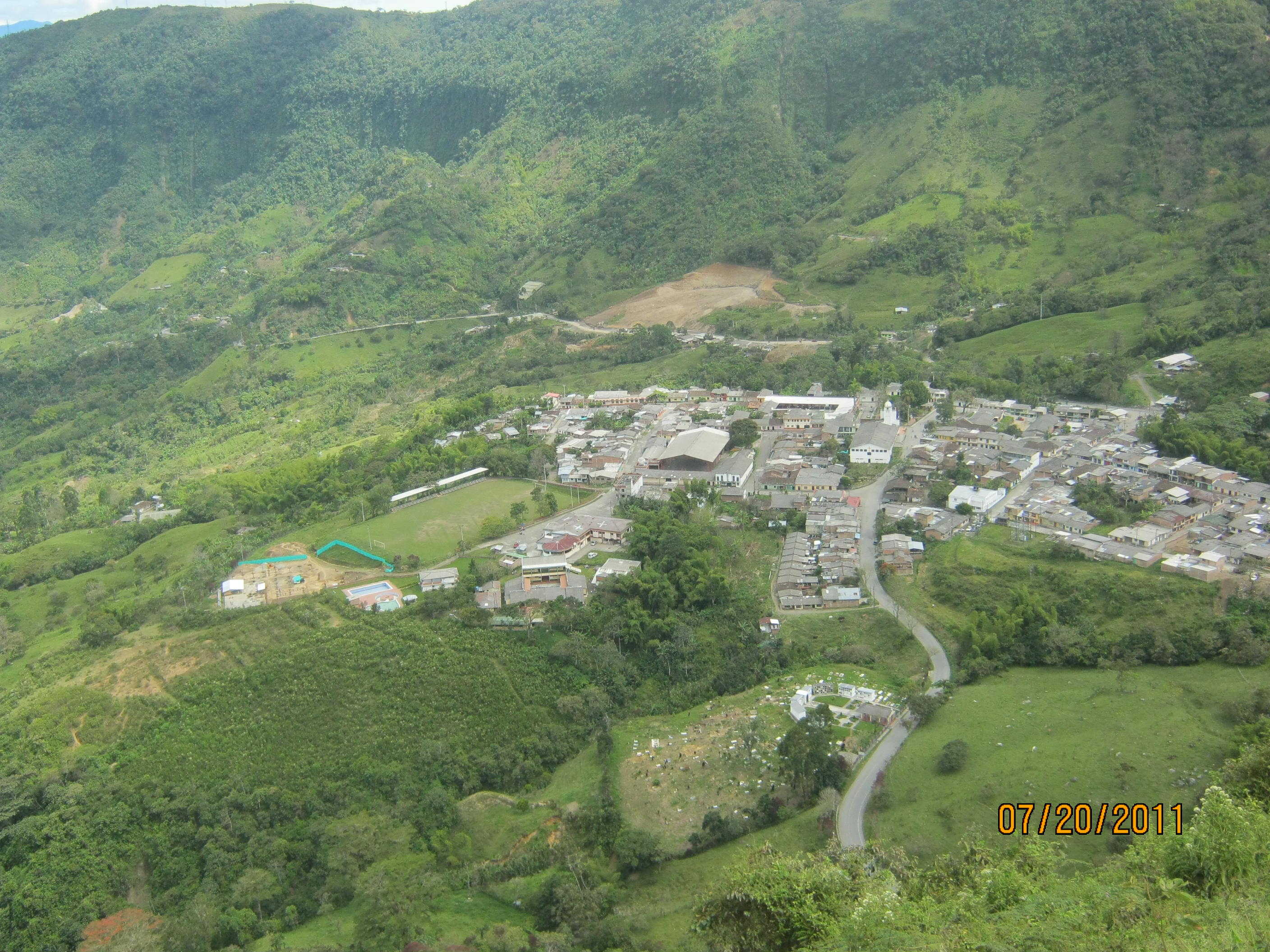 Panorámica de Rosas Cauca, tomado desde el Cerro de San Francisco